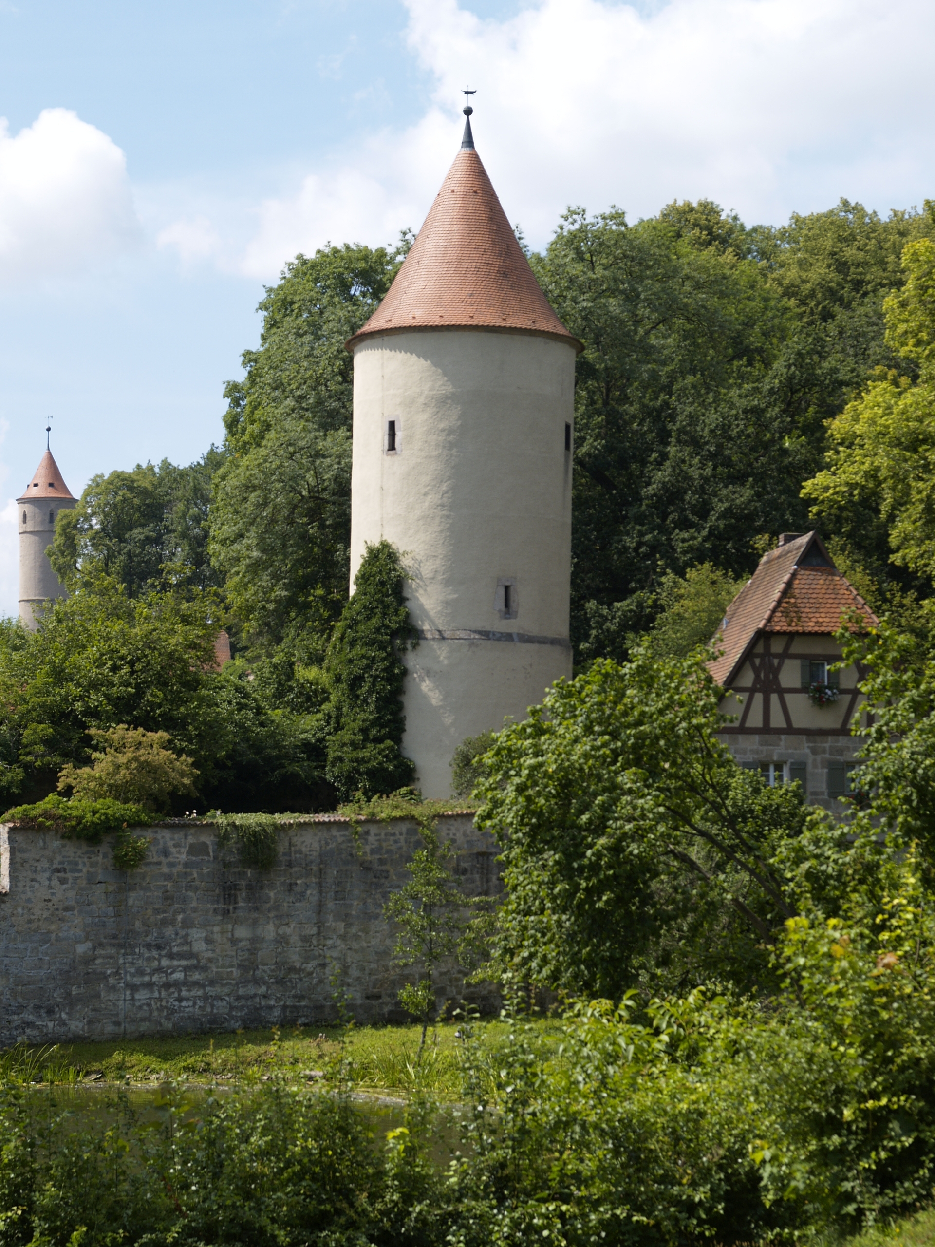 Dinkelsbühl: Faulturm im Stadtpark